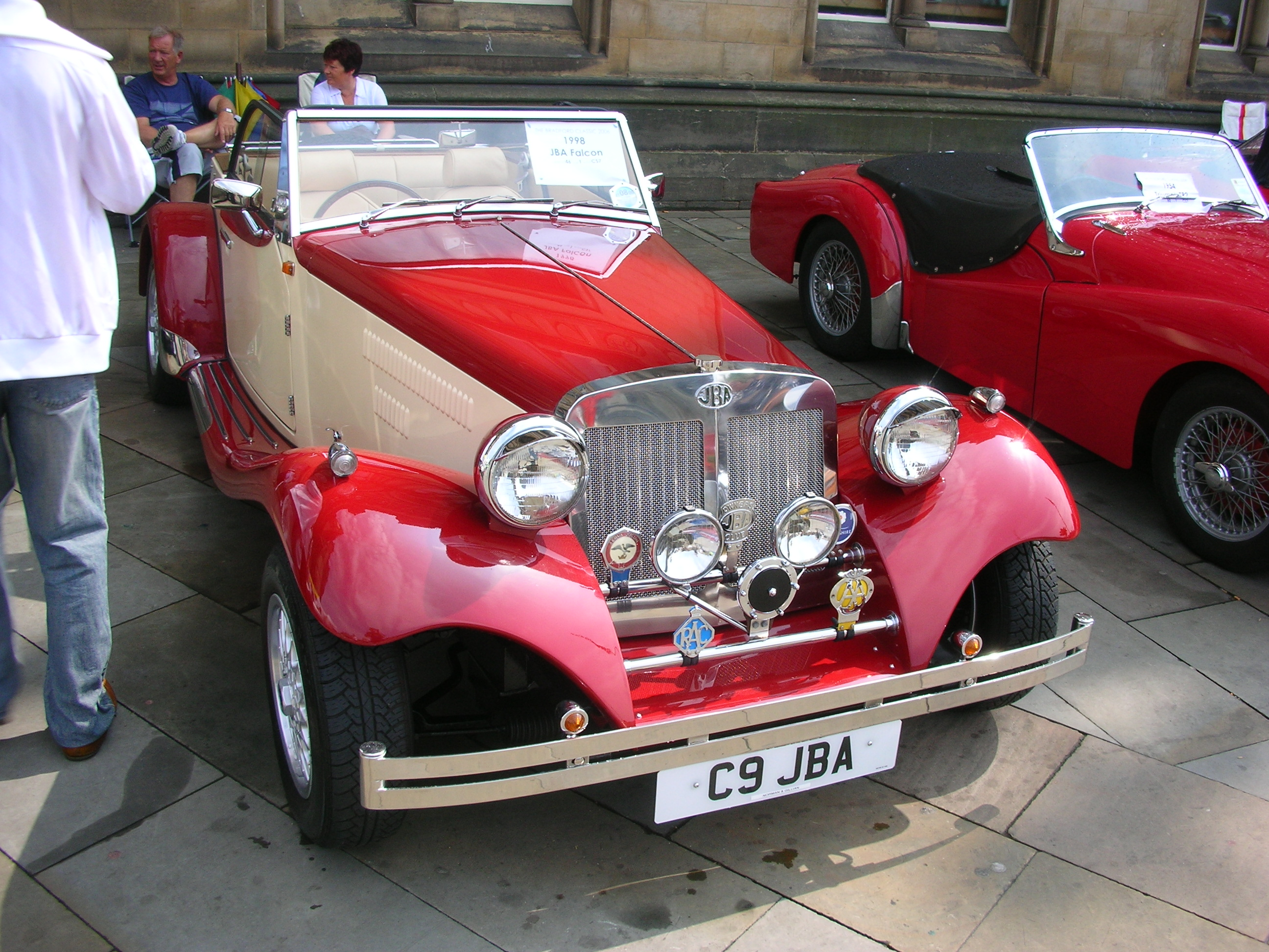 1998 JBA Falcon